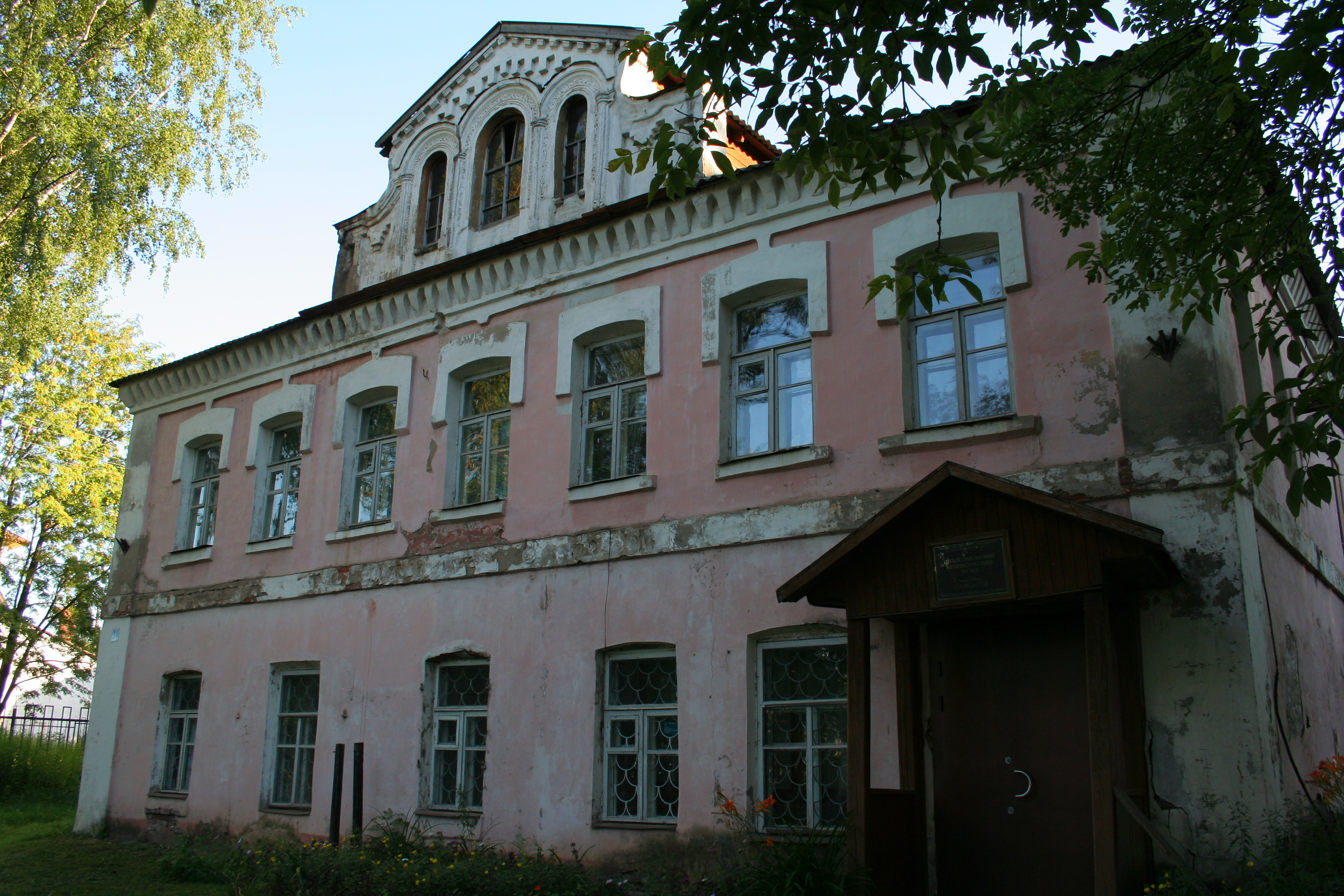 Stadt Lichoslawl (Oblast Twer, Russland). Heimatmuseum.